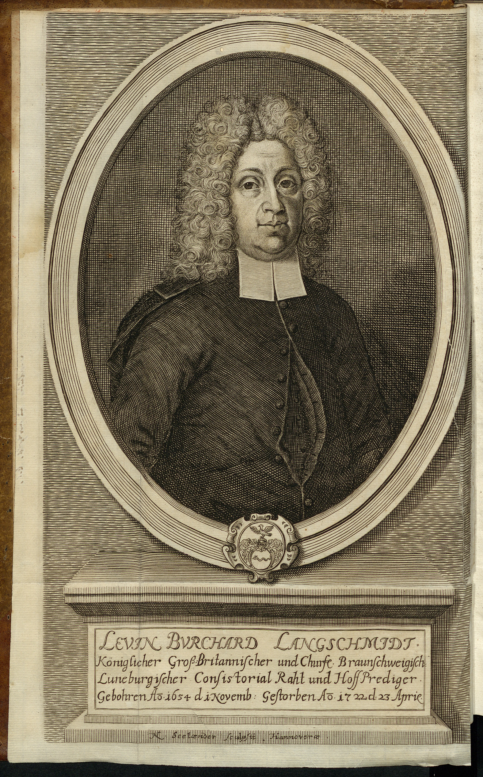 Kupferstich mit einem Brustbild des evangelischen Geistlichen, Konsistorialrats und kurhannoverschen Hofpredigers Levin Burchard Langschmidt (1654–1722), gestochen von dem Hofkupferstecher Nicolaus Seeländer und als Frontispiz in die Leichenpredigt für den Abgebildeten durch den Hofprediger David Rupert Erythropel eingefügt.